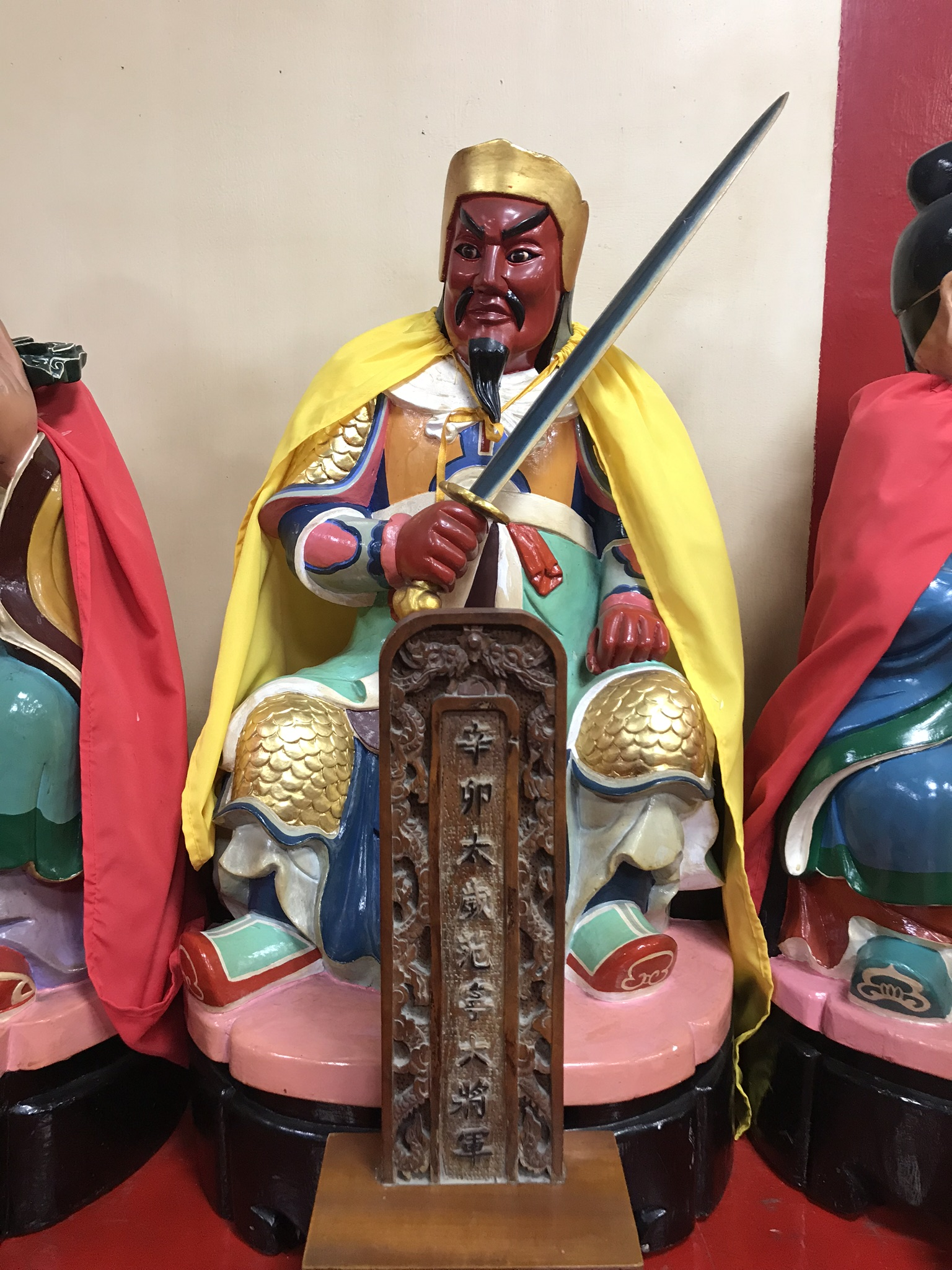 辛卯太歲范寧大將軍神像